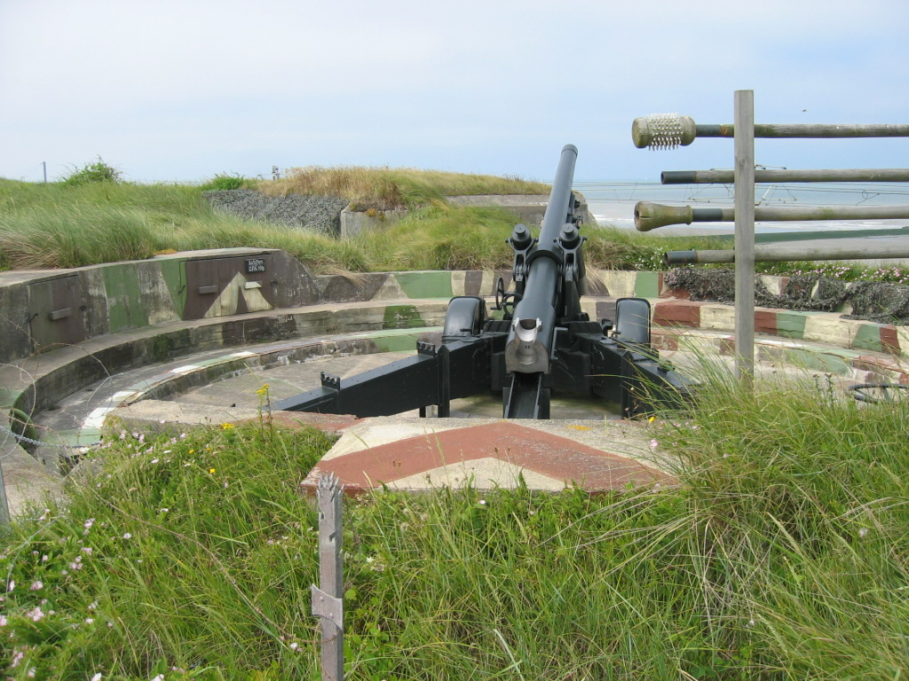 Geschutsbedding met origineel artilleriestuk in het domein Raversijde, België. Hier is een deel van de Atlantikwall uitzonderlijk goed bewaard. Deze bedding maakte deel uit van de batterij Saltzwedel neu (1941).